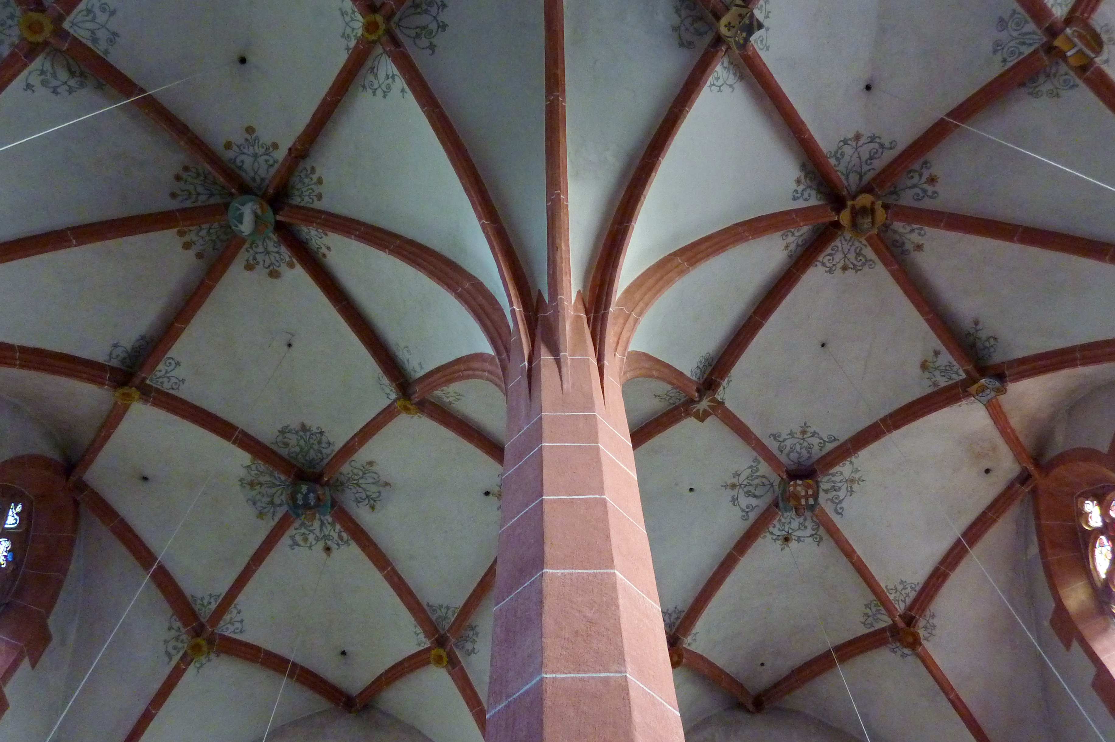 Katholische Wallfahrtskirche Mater Dolorosa in Driesch, einem Ortsteil von Lutzerath im Landkreis Cochem-Zell (Rheinland-Pfalz), Sterngewölbe mit Schlusssteinen